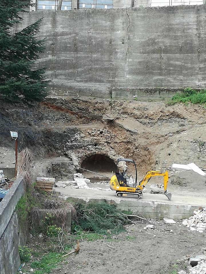 Stato dello scavo per il recupero di una presunta tricora bizantina a Pazzano (RC -Italy)